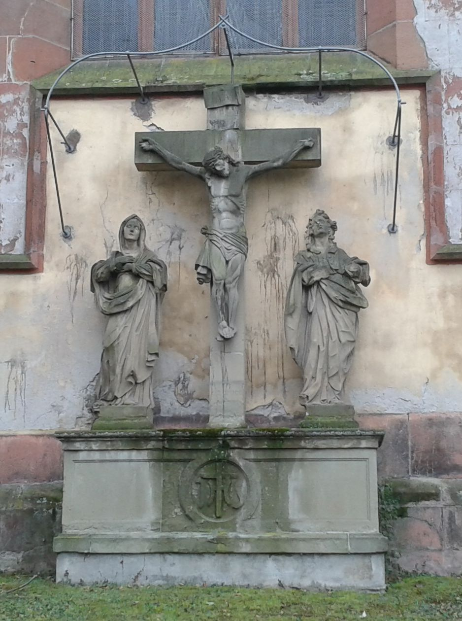 Jesusrelief Liebfrauenkirche Worms